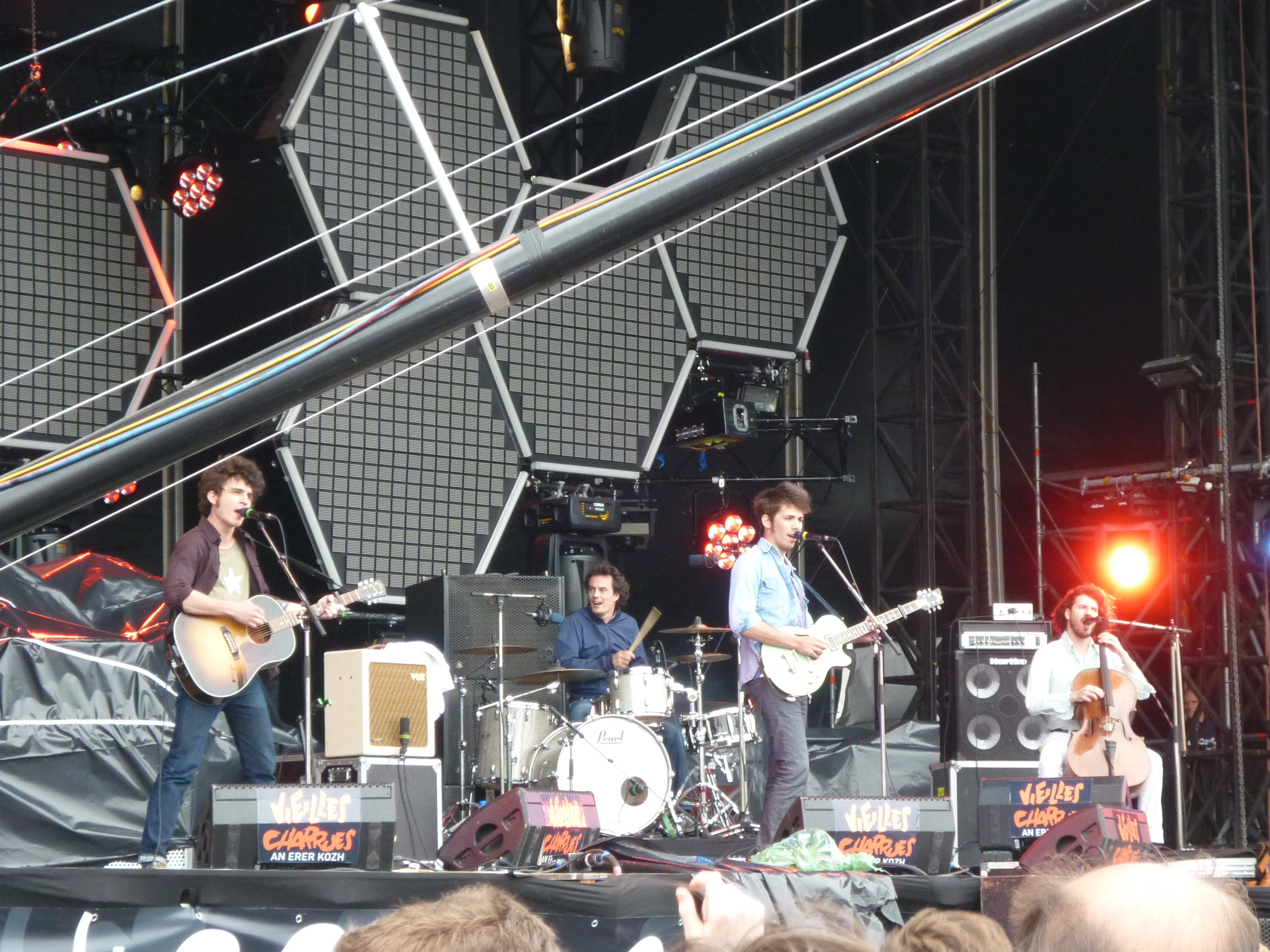 Revolver lors du Festival des Vieilles Charrues à Carhaix en France en 2010.